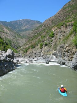 Devolli River (Albania)